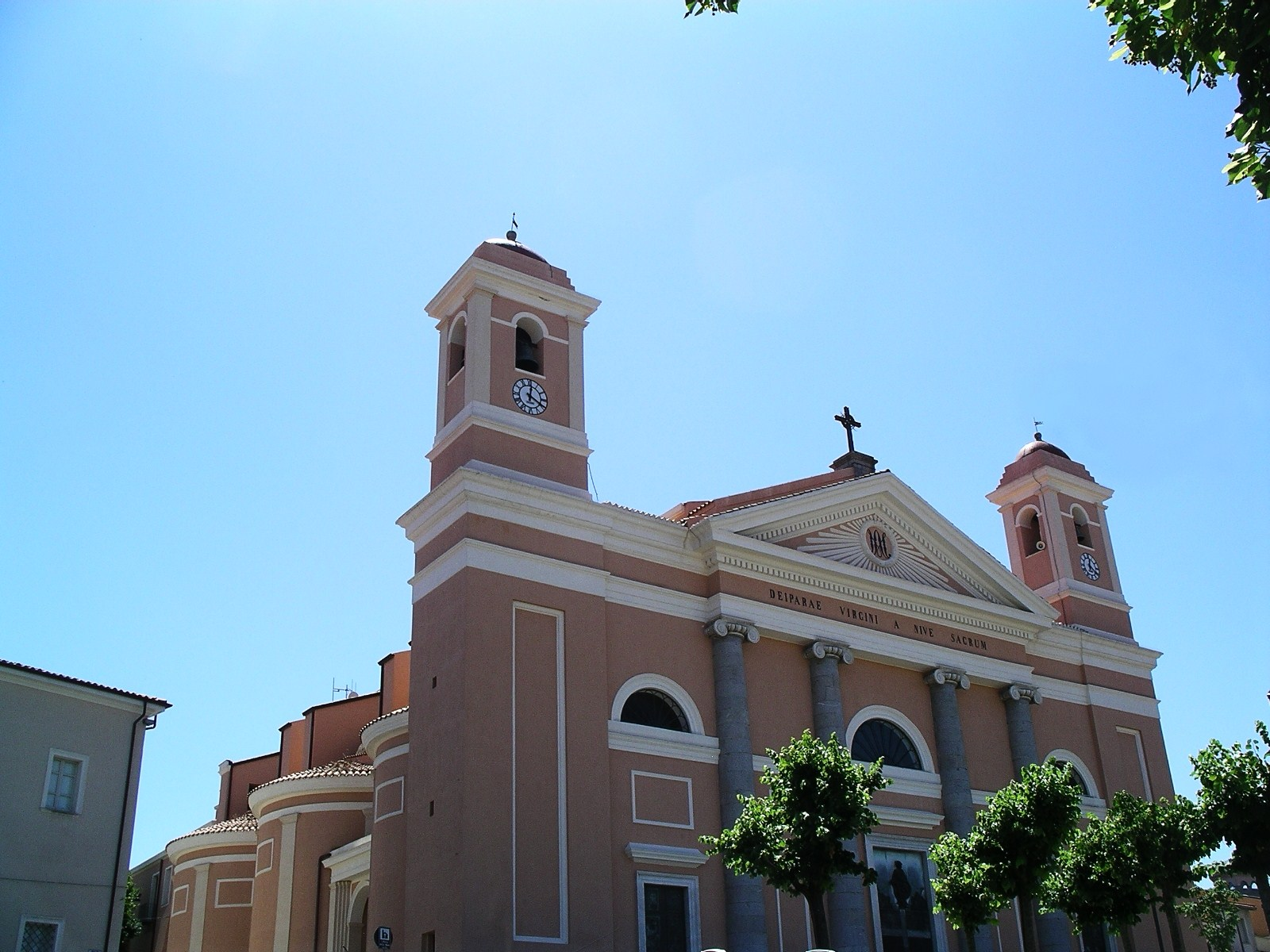 Cattedrale